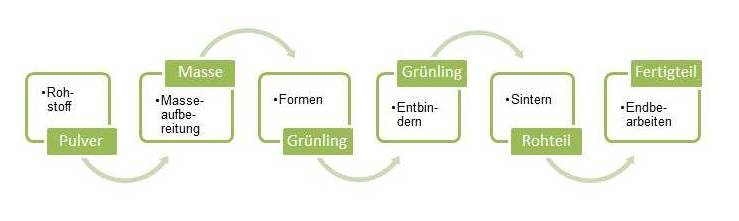 Herstellungsprozess Keramikspritzguss